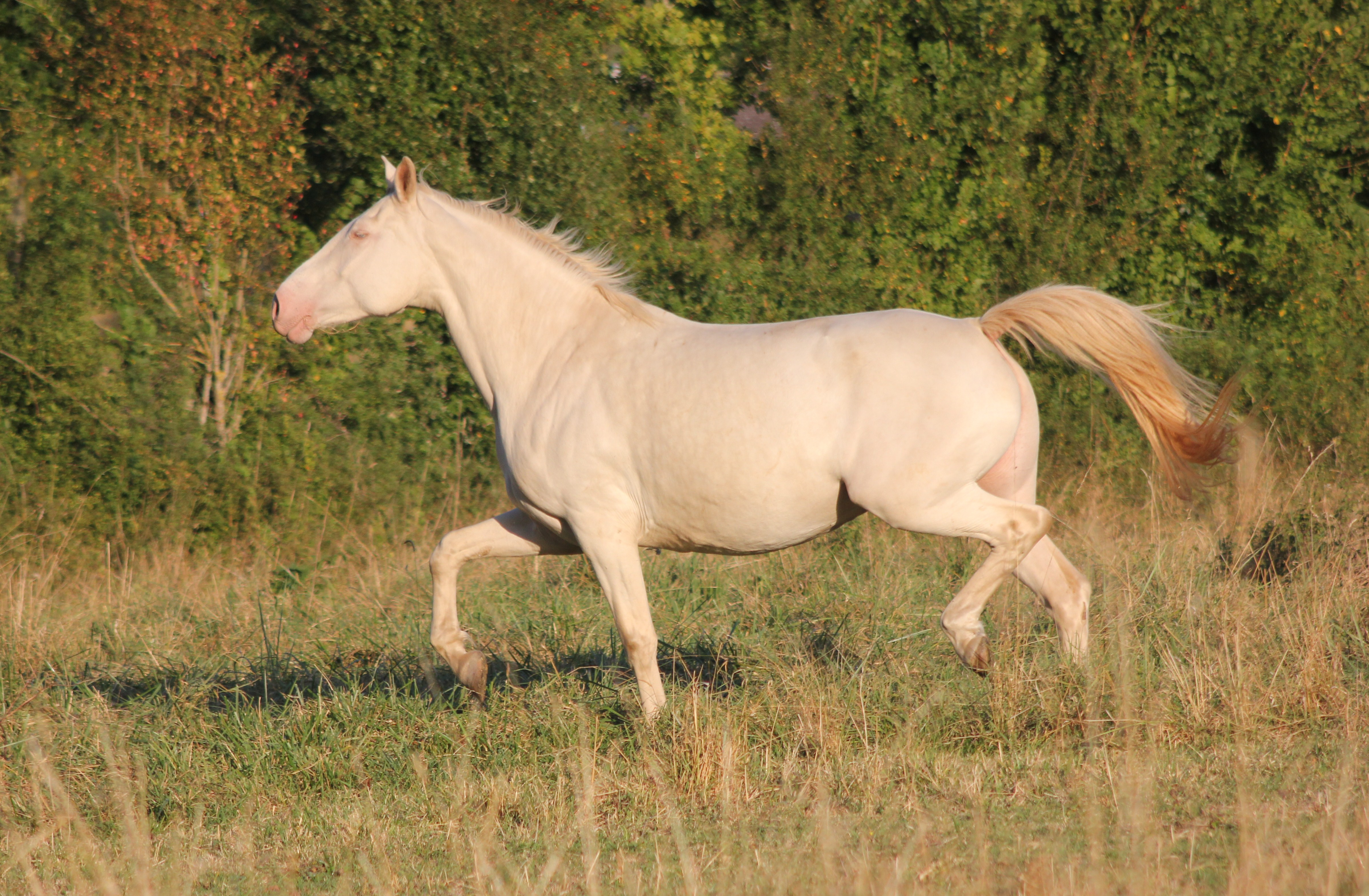 Jument de race creme